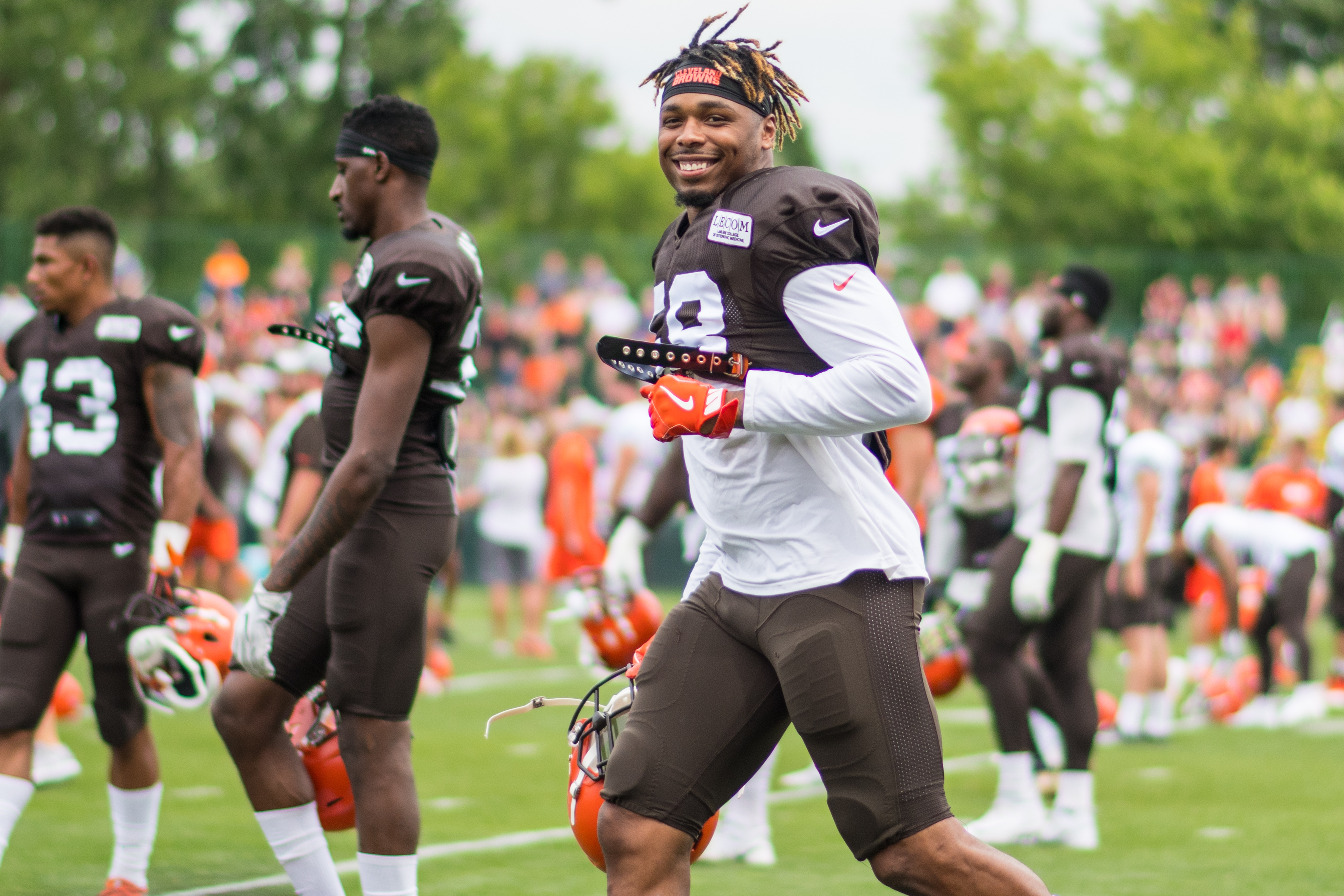 Christian Kirksey